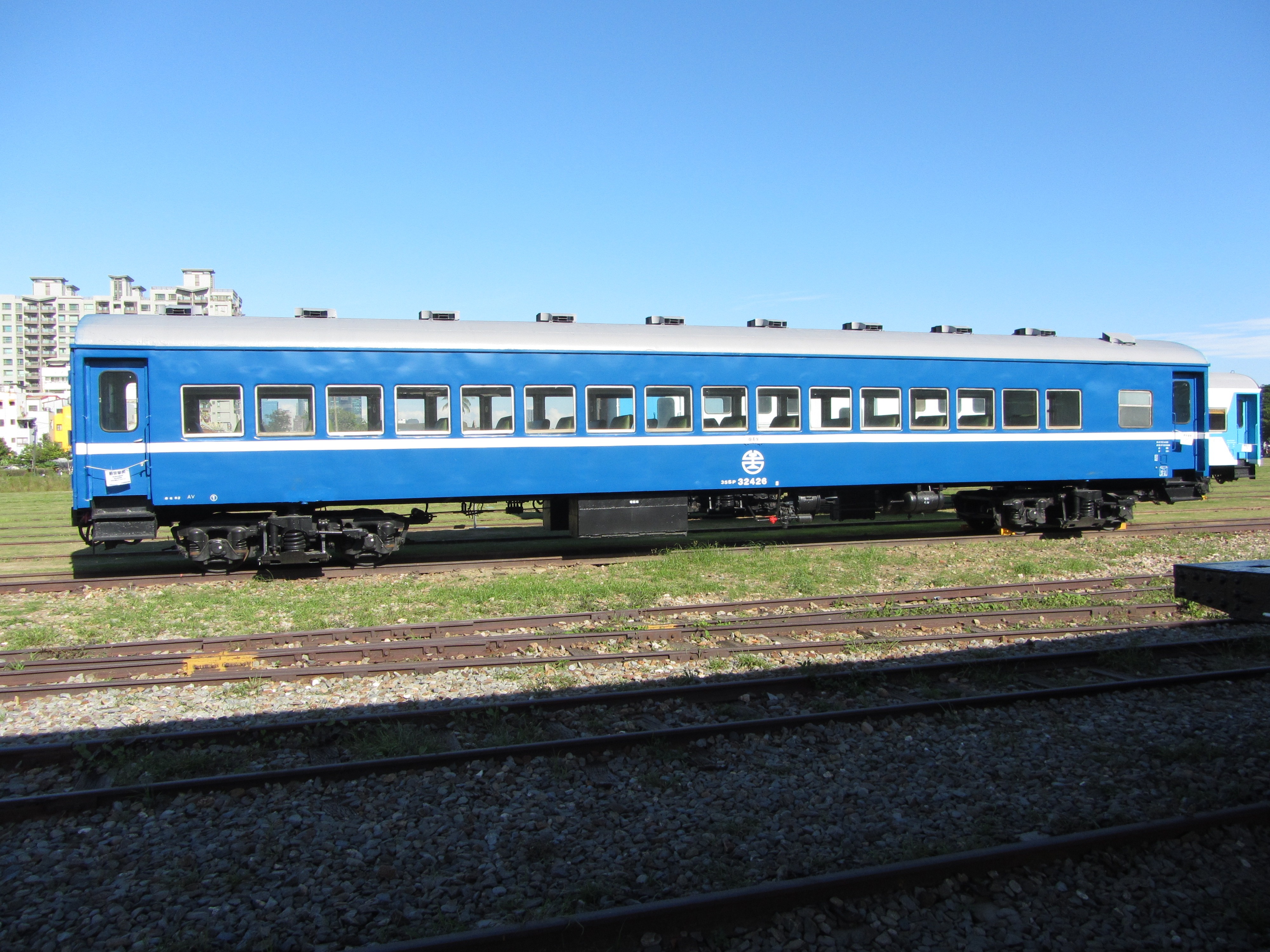 高雄港車站內靜態展示的35SP32426平快車車廂。